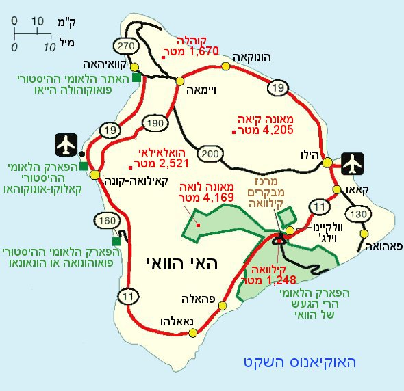 Hawaii national parks map